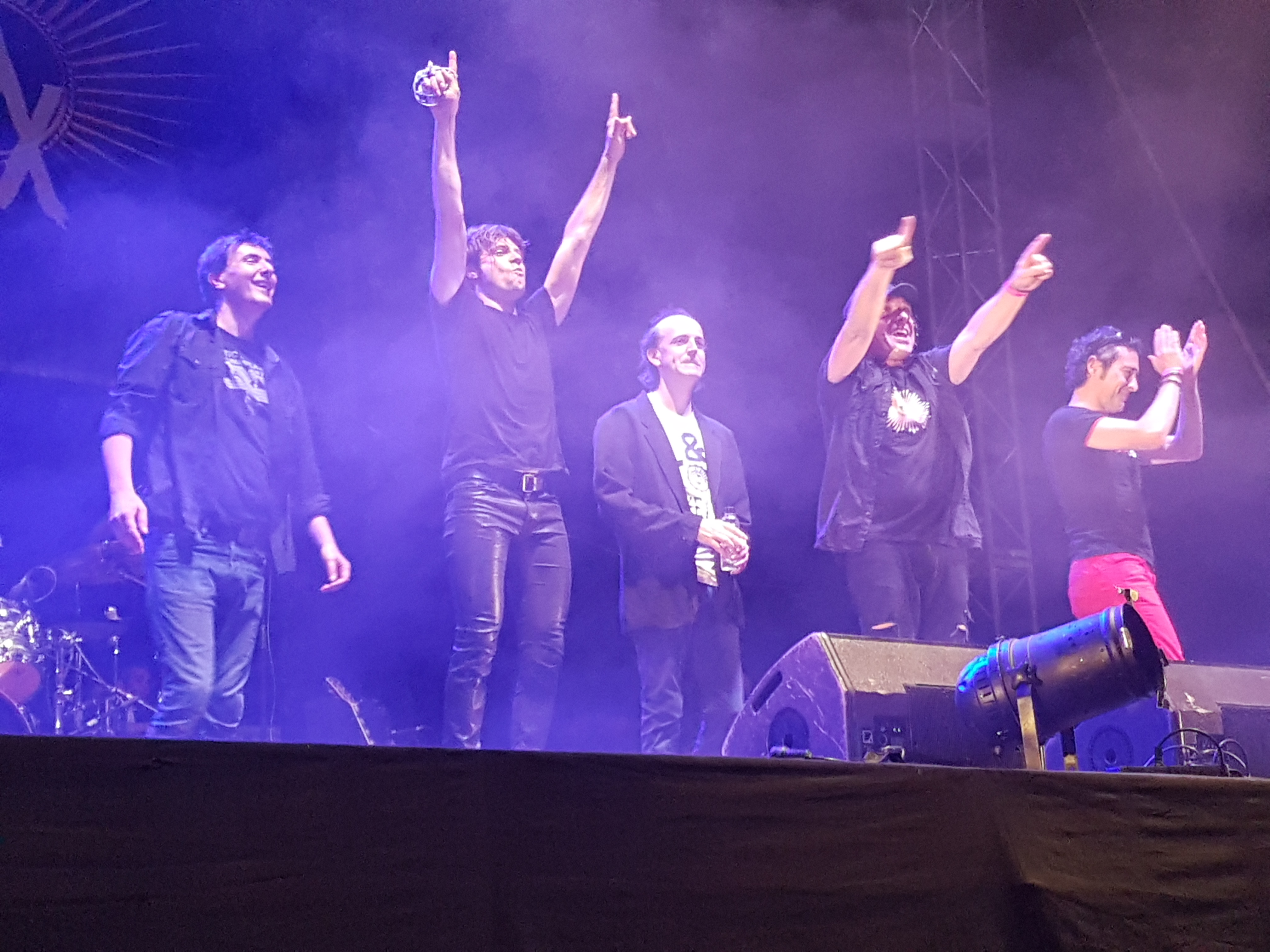 Lax'n'Busto en un concert a Valls el 2016: D'esquerra a dreta: Jesús Rovira, Salva Racero, Cristian Montenegro, Pemi Rovirosa i Jaume Piñol.